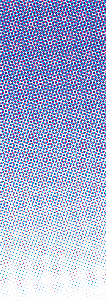 Blau, Zusammendruck von Cyan und Magenta